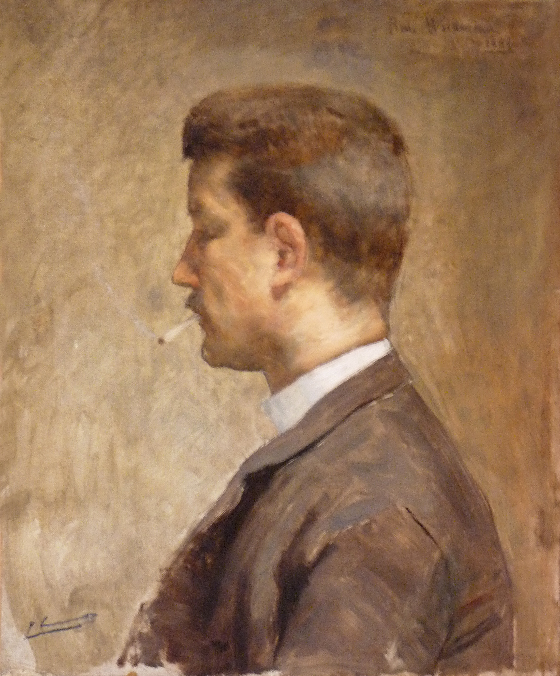 Pierre Waidmann (1860-1937) : Autoportrait à la cigarette. Huile sur toile marouflée sur carton. 1884. Musée Charles Friry (Remiremont, Vosges)